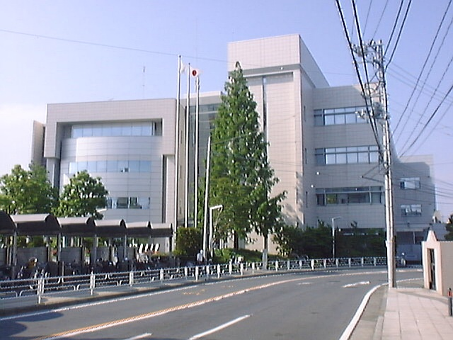 Izumi-ku Ward Office, Izumi-ku, Yokohama, Kanagawa, Japan (泉区役所)